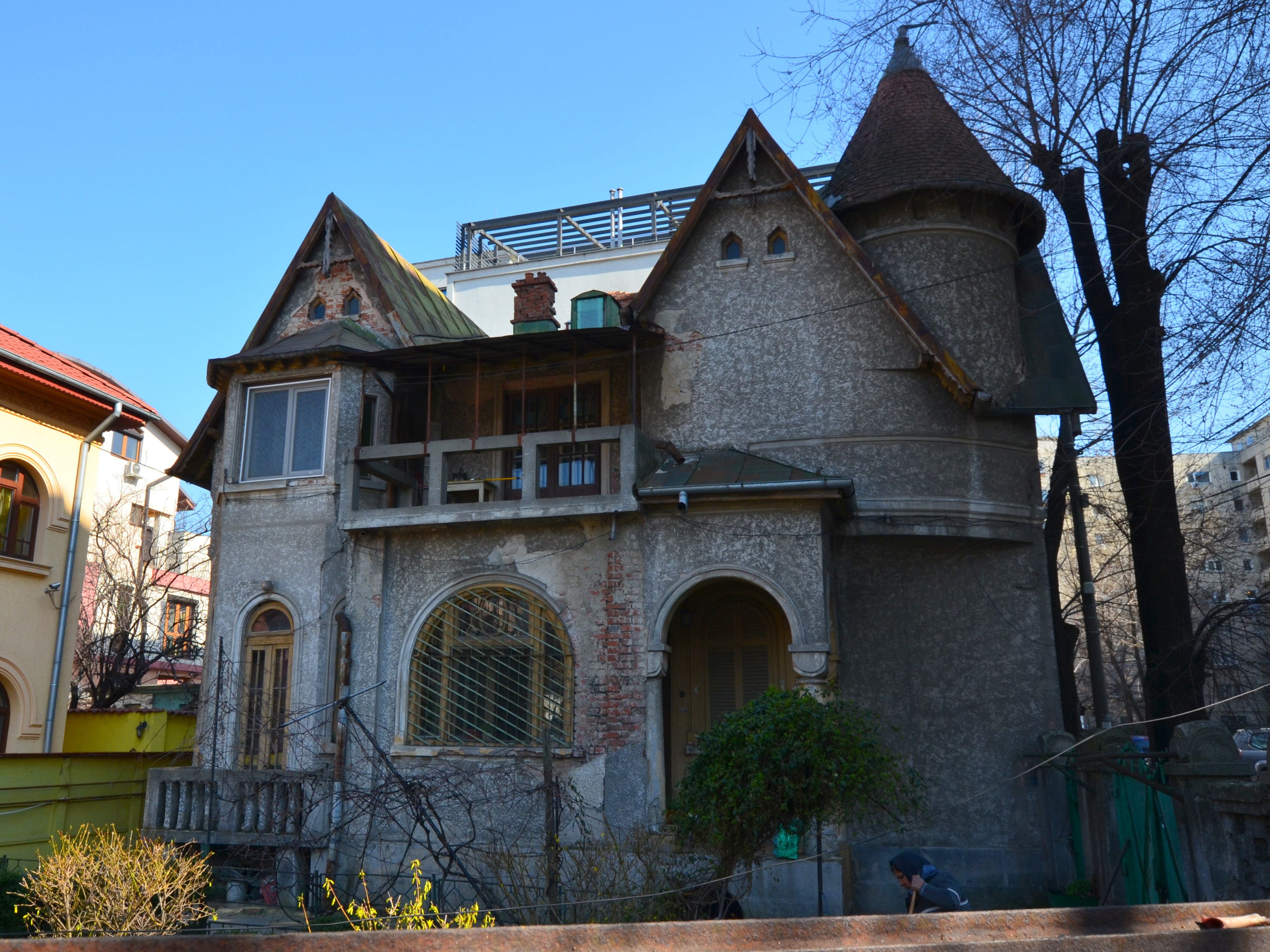 Casă, Str. Vlad Județul nr. 16